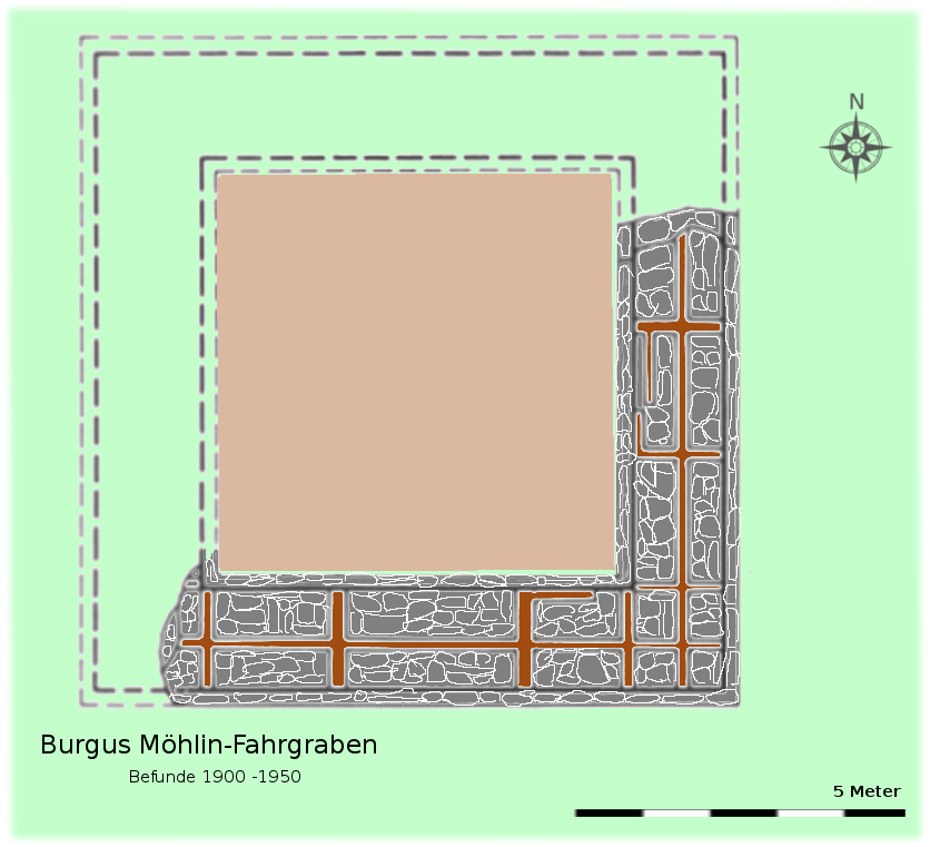 Befundskizze des spätrömischen Wachturms von Möhlin-Fahrgraben. Von Veleius coloriert und beschriftet.